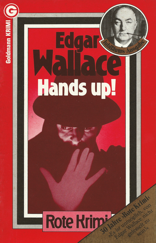 Edgar Wallace: Hands up! Goldmann Verlag, München, 1982. DNB